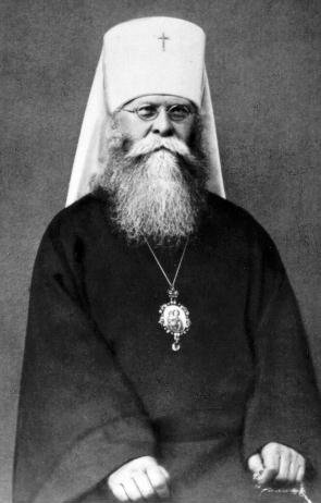 Иосиф (Петровых, митрополит, 1872-1937)